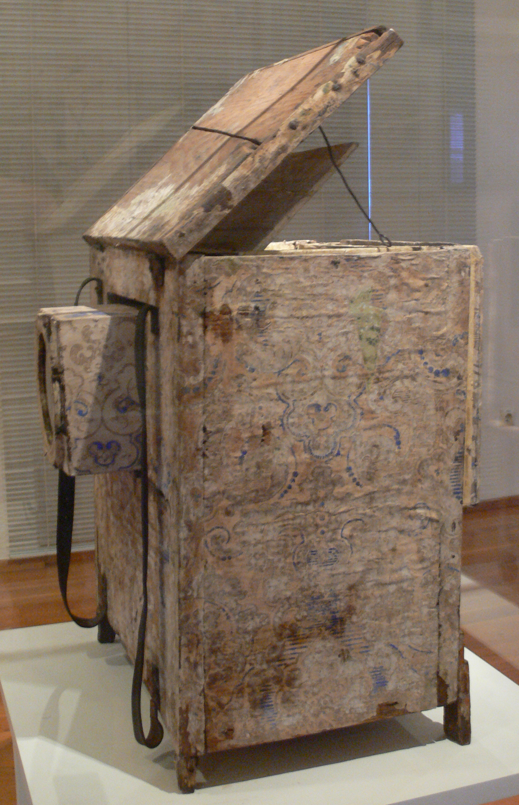 Jahrmarkts-Guckkasten mit Trageriemen, mit farbigem Papier beklebt Landesmuseum Württemberg (Außenstelle Museum für Volkskultur in Württemberg, Waldenbuch) Inv. Nr. VK 1982/259a